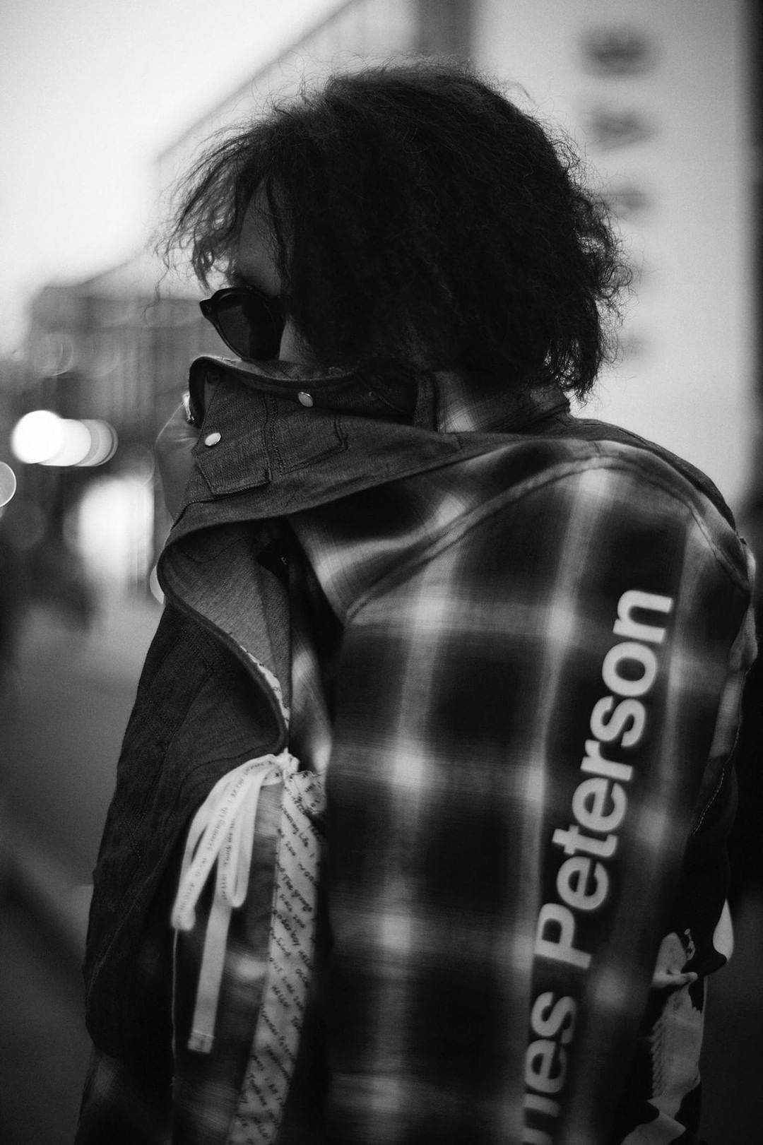 Kosuke Ichikawa portrat 2019.07.25